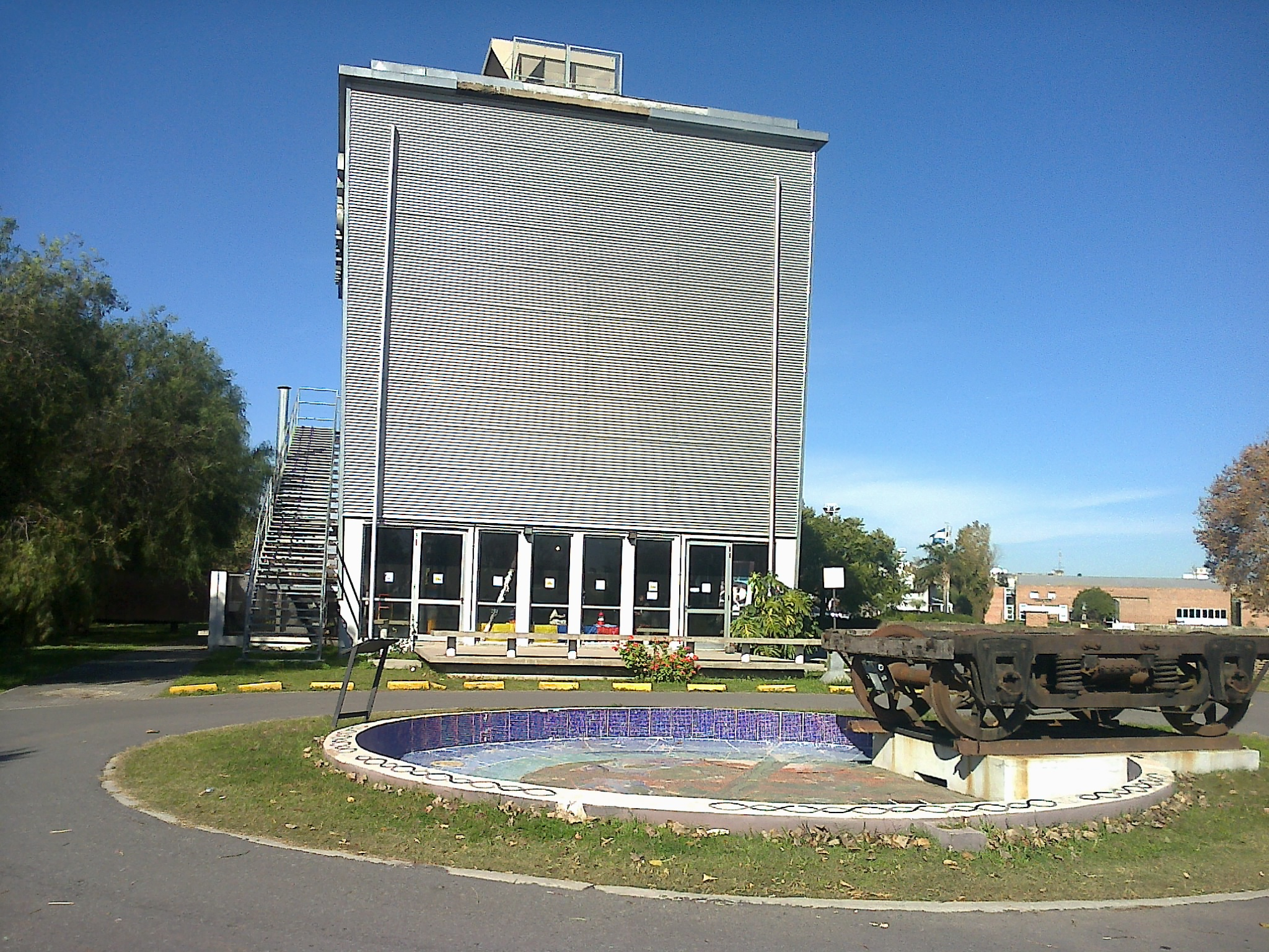 Cine Tita Merello y fuente con zorra ferroviaria en el predio de la Universidad de Lanús.